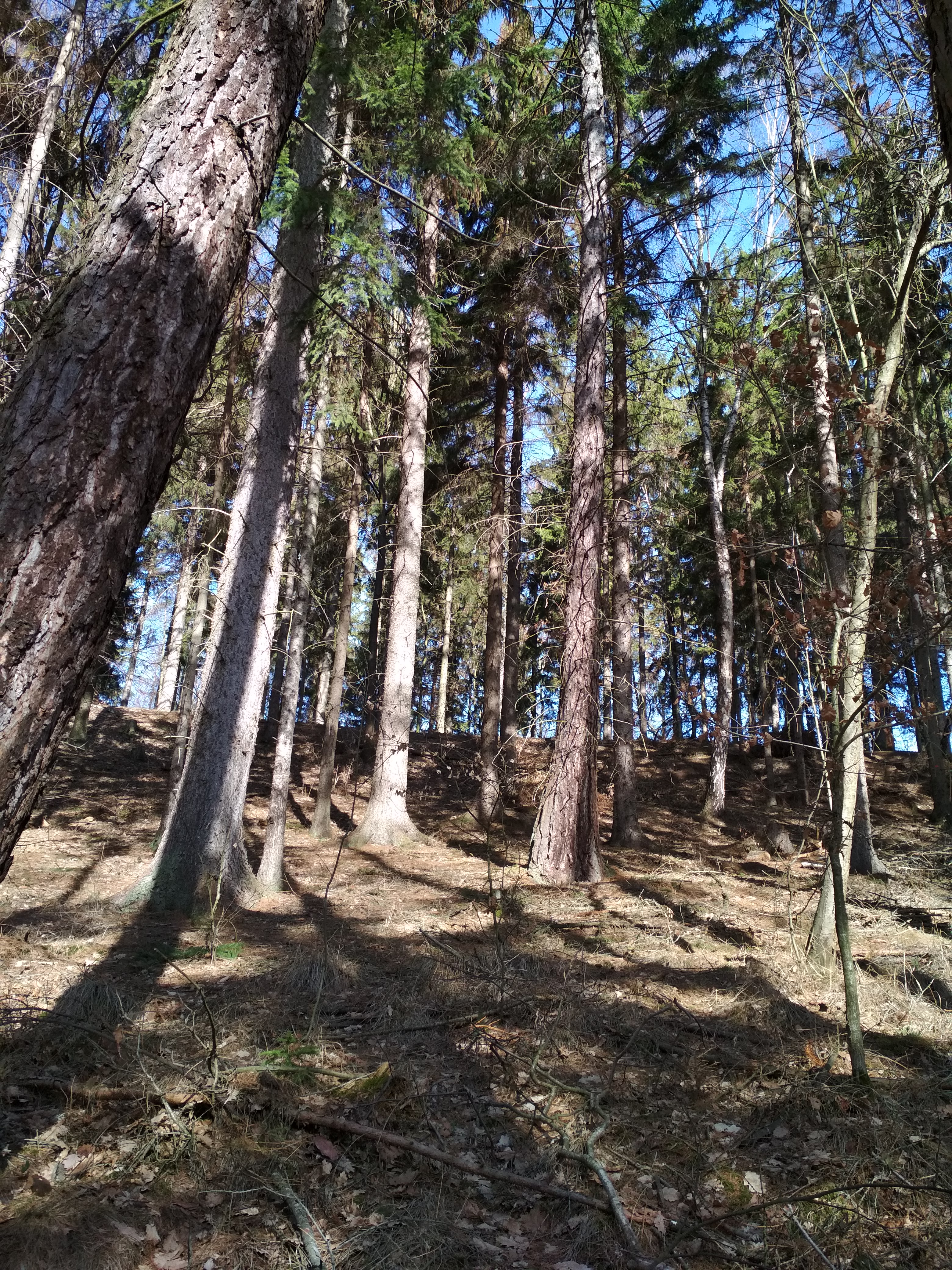 Pohled na val z cesty vedoucí k mauzoleu